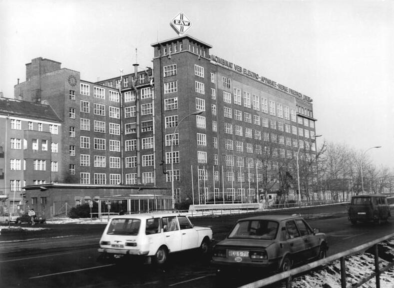 Berlin, EAW Treptow, Hauptgebäude ADN-ZB Junge 4.2.87 Berlin: Das EAW Treptow- Im Stammbetrieb des Kombinates Elektro-Apparate-Werke (RAW) in Berlin - Blick auf das Hauptgebäude - entstehen u.a. Motorschutzrelais auf modernen Fertigungslinien.